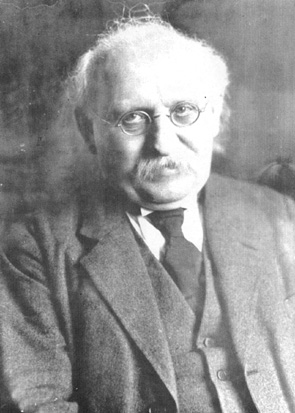 Otto Immisch (1862–1936), deutscher klassischer Philologe